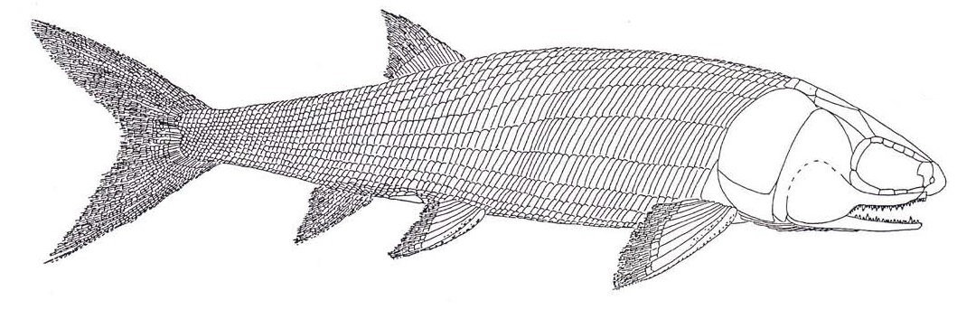 Gabanellia agilis recon